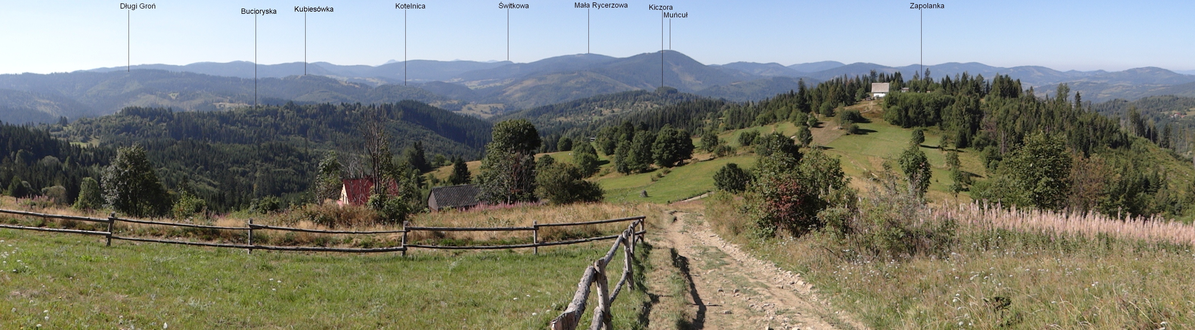 Panorama widokowa z osiedla Zapolanka na grzbiecie Redykalnego Wiechu